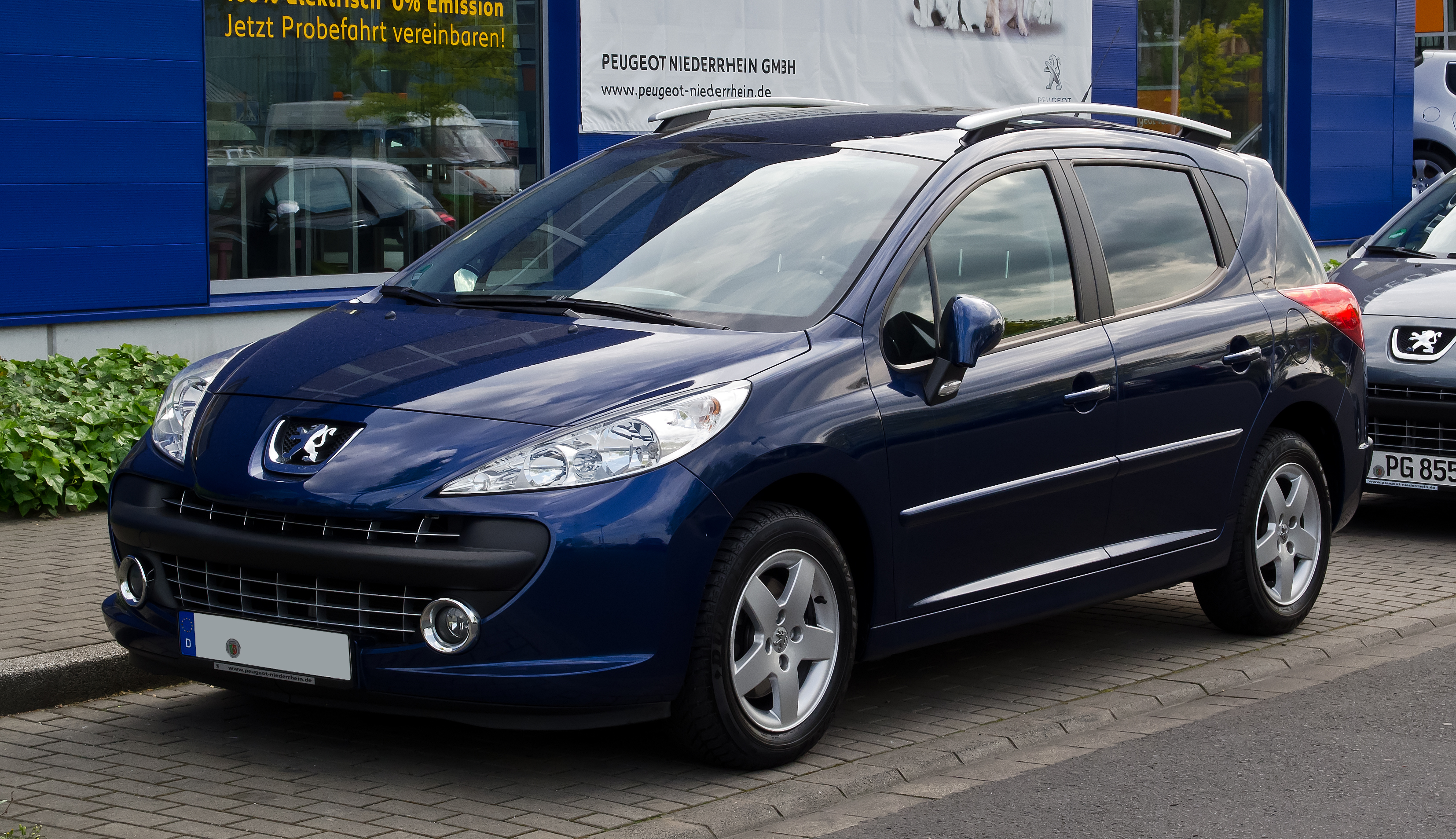 Peugeot 207 SW